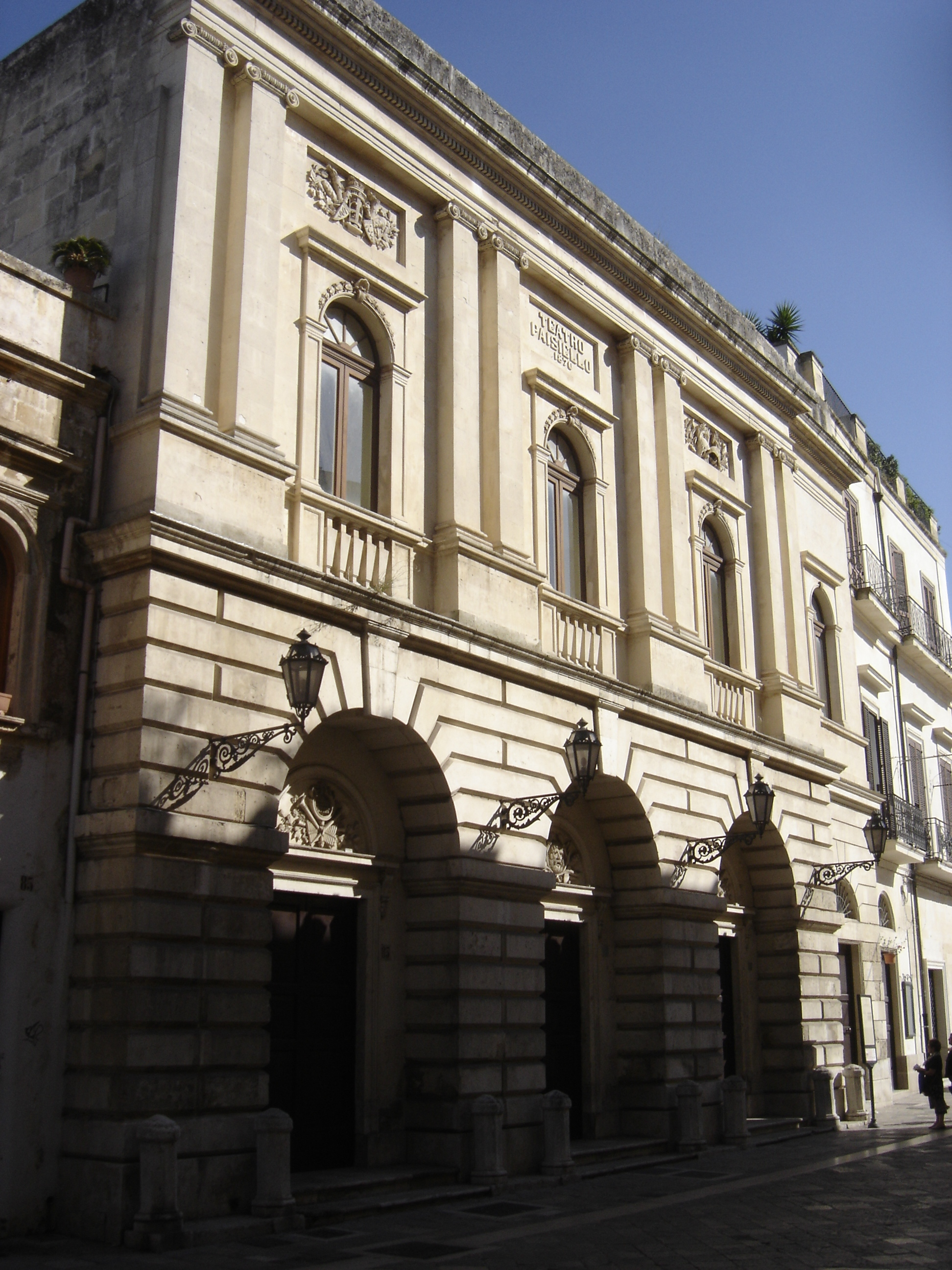 Teatro Paisiello à Lecce (Italie) - Ce théâtre dédié au musicien Giovanni Paisiello, originaire de Tarente, fut inauguré en décembre 1870 avec la représentation de l'opéra Un ballo in maschera de Giuseppe Verdi.